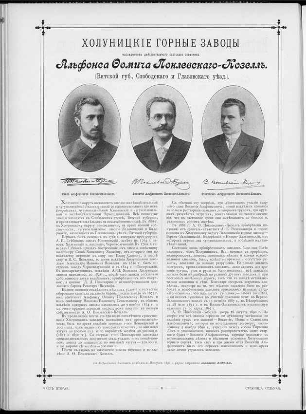 Страница Холуницкий горных заводов в альбоме участников Нижегородской ярмарки 1896 года